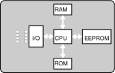 Aufbau einer asynchronen Chipkarte. Dieses Bild wurde von Martin Hawlisch erstellt und unter der GFDL veröffentlicht.